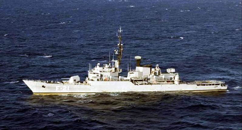 F-21 Mariscal Sucre modernized